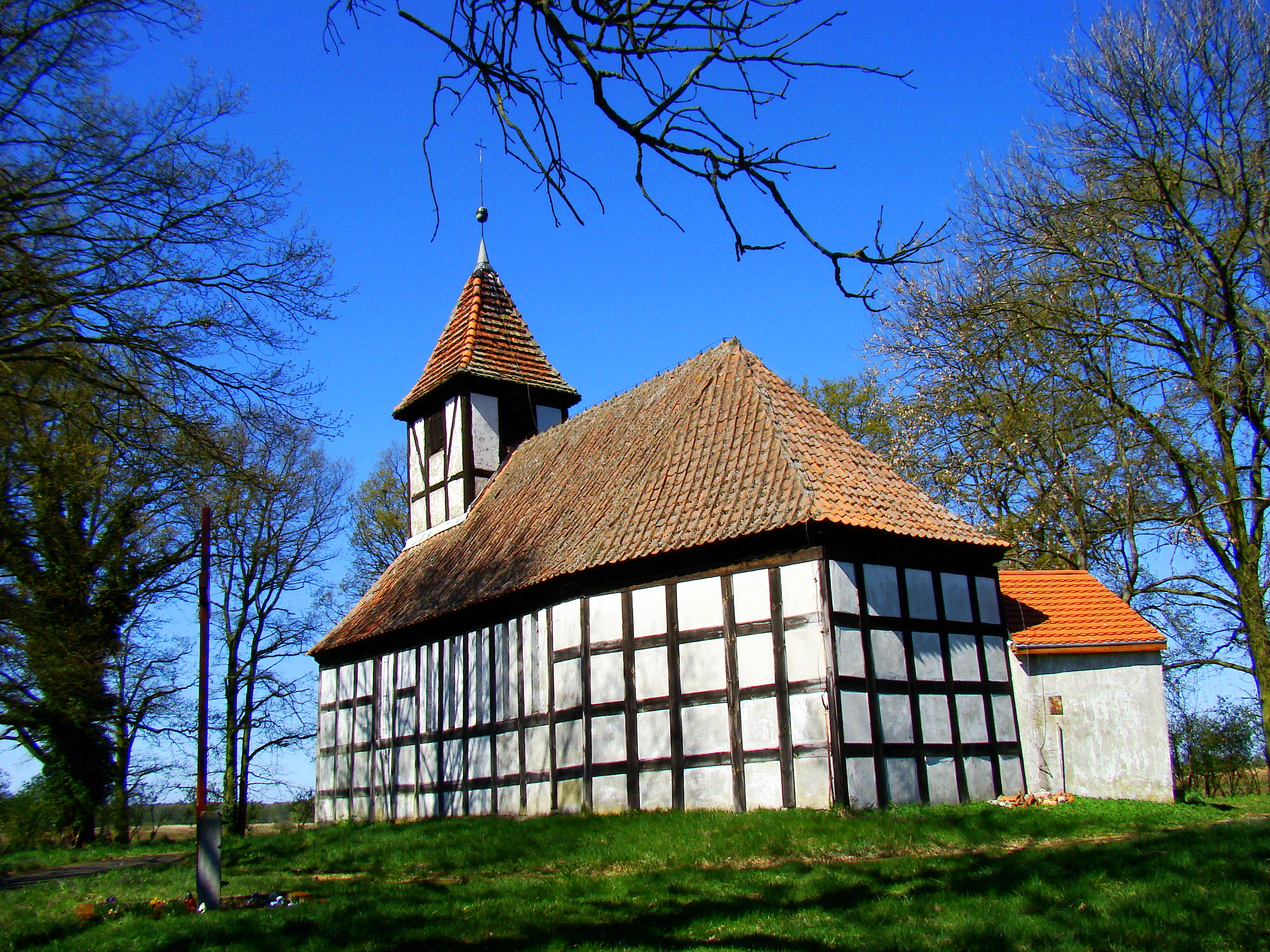 Warnołęka - dawny kościół ewangelicki, obecnie rzymskokatolicki filialny p.w. Matki Boskiej Częstochowskiej, 1 poł. XVIII